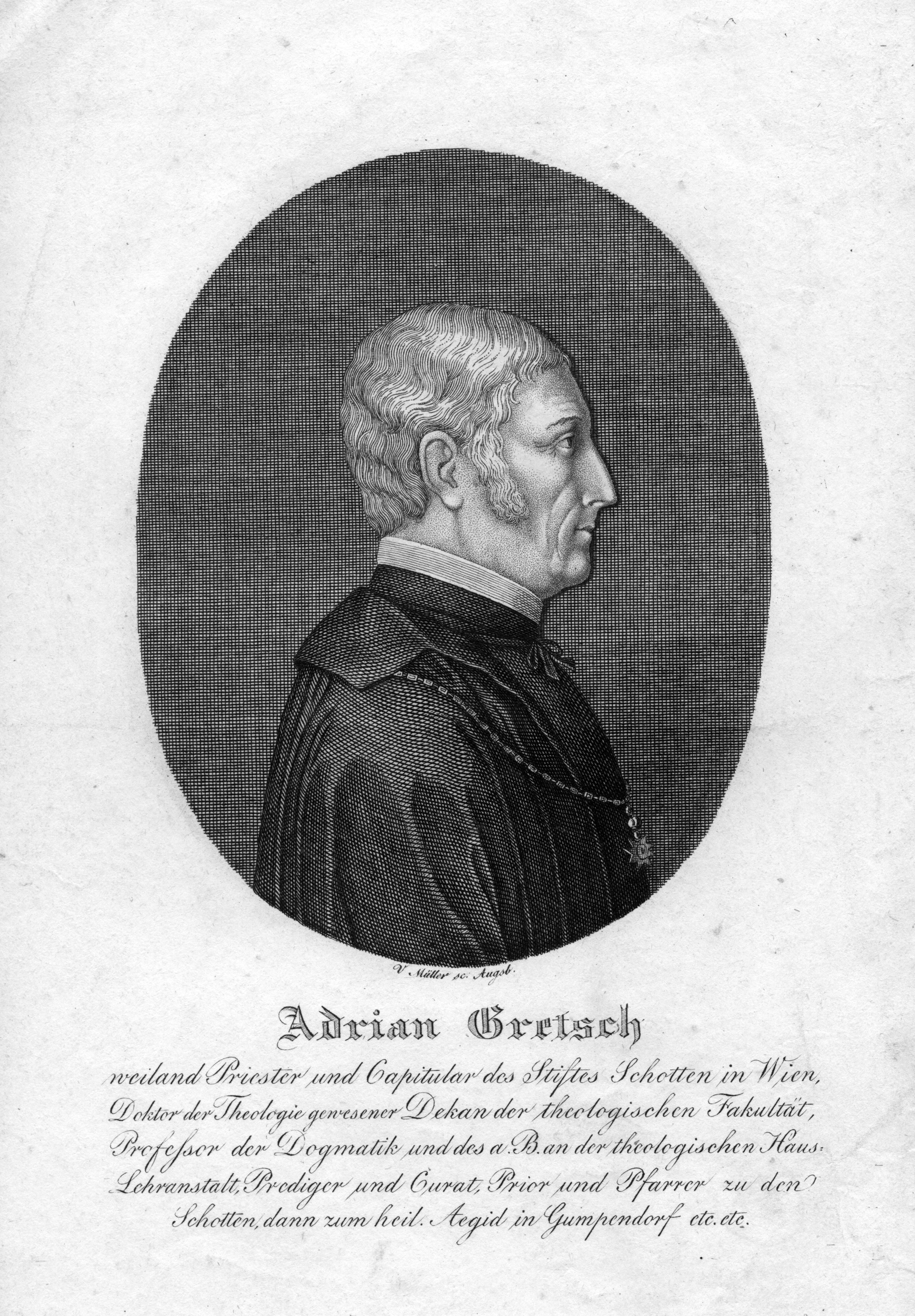 portrait gravé